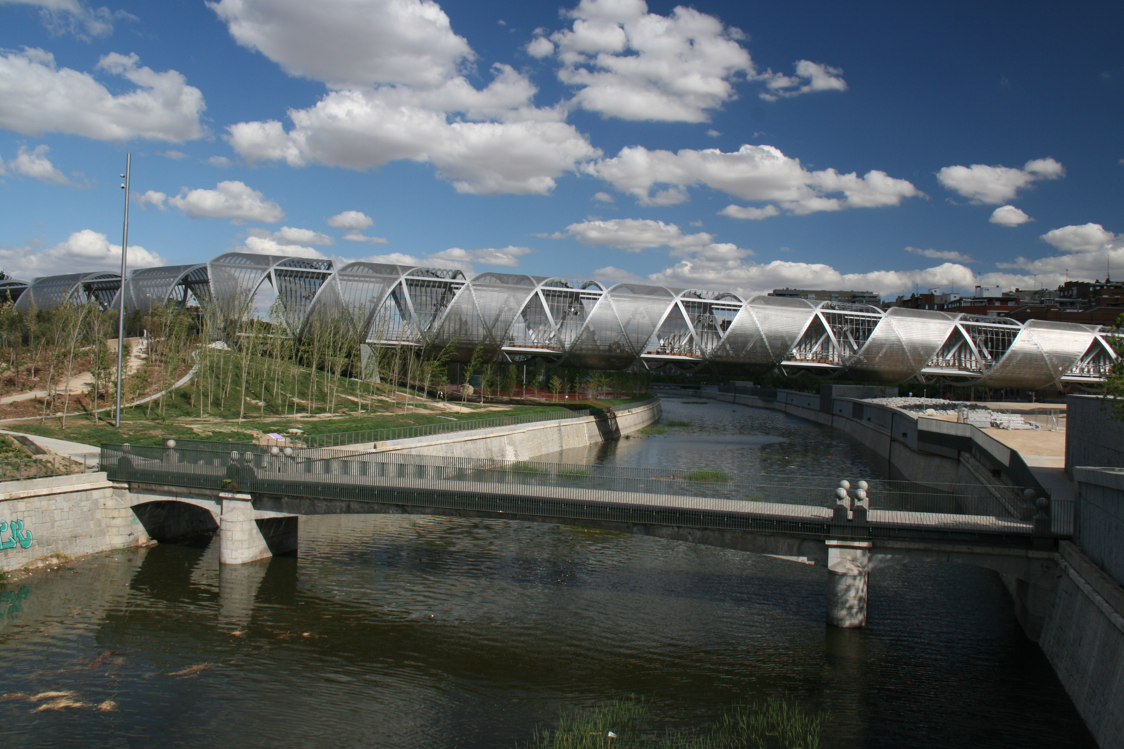 pasarela de Arganzuela - Madrid Río